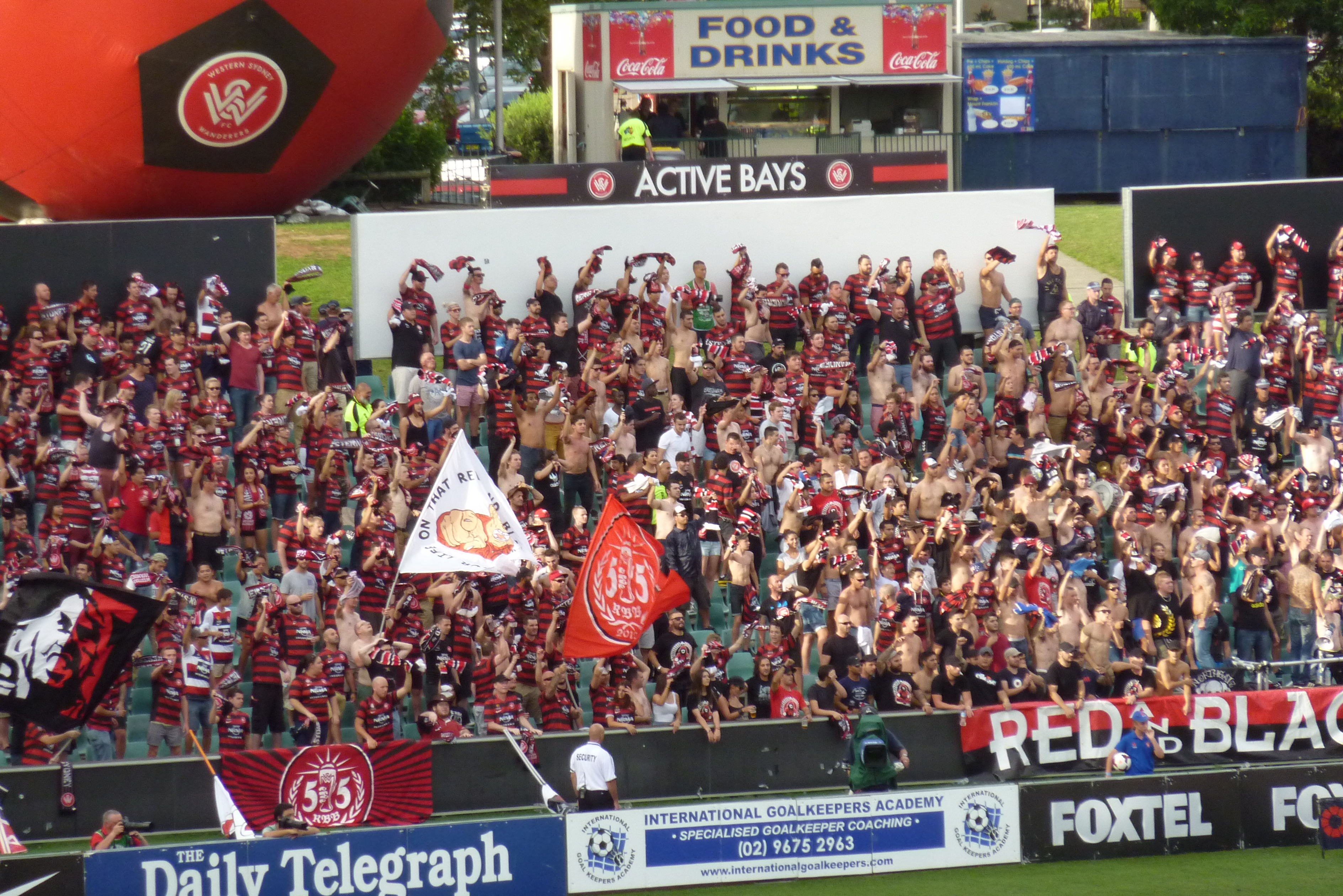 Wanderers v Glory